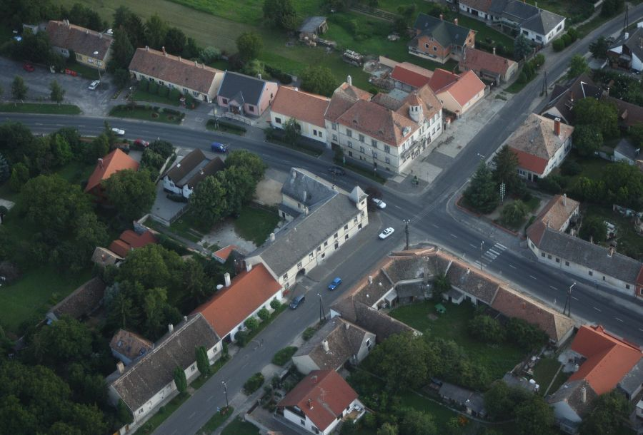 Nagycenk faluközpontja és a községháza, Győr-Moson-Sopron megye